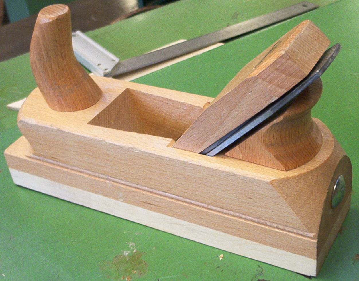 Houten blokschaaf zelfgemaakte foto voor het publiek domein. Martink. Licensing Categorie:Afbeelding gereedschap